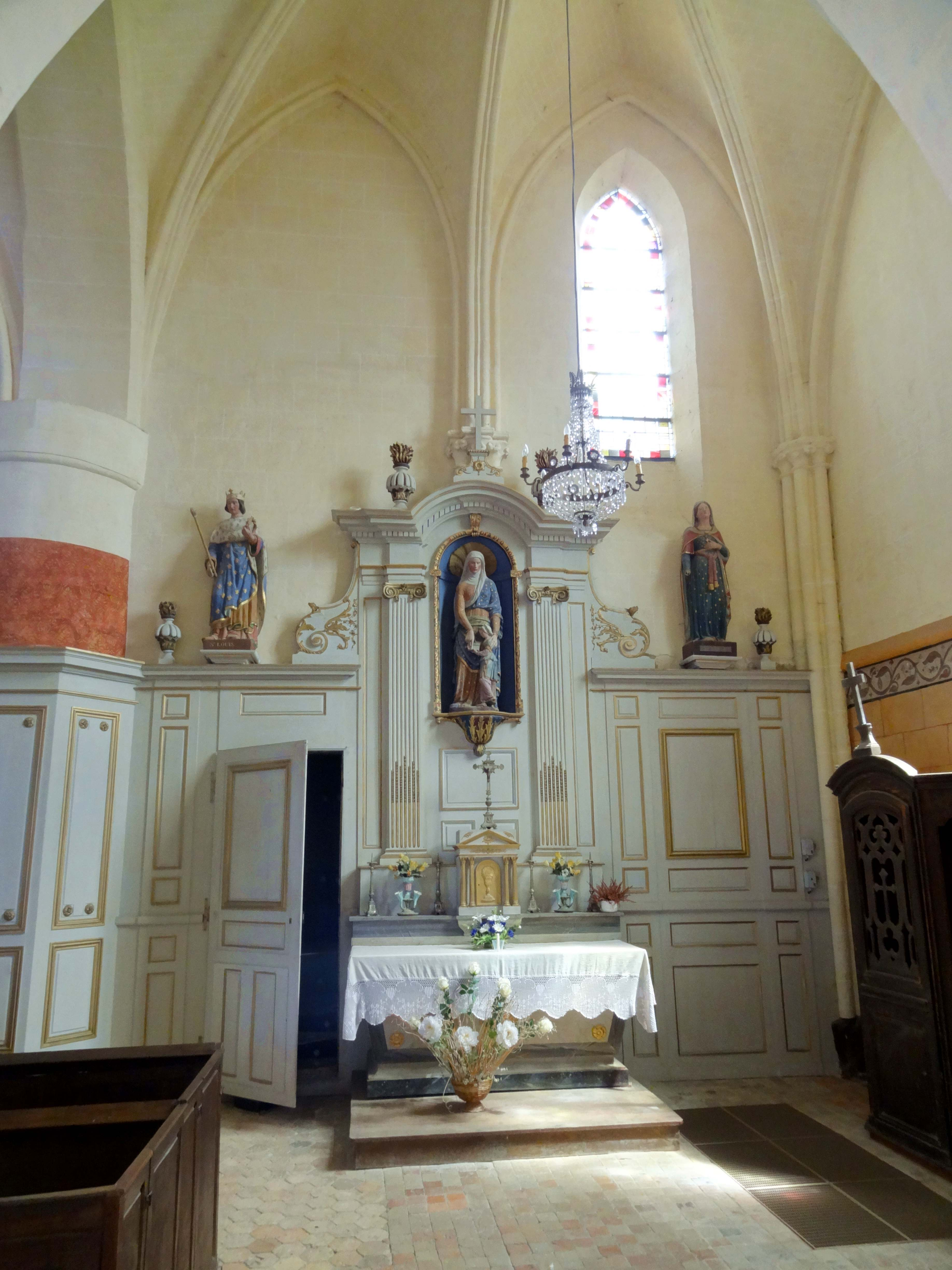 Intérieur de l'église - voir titre.